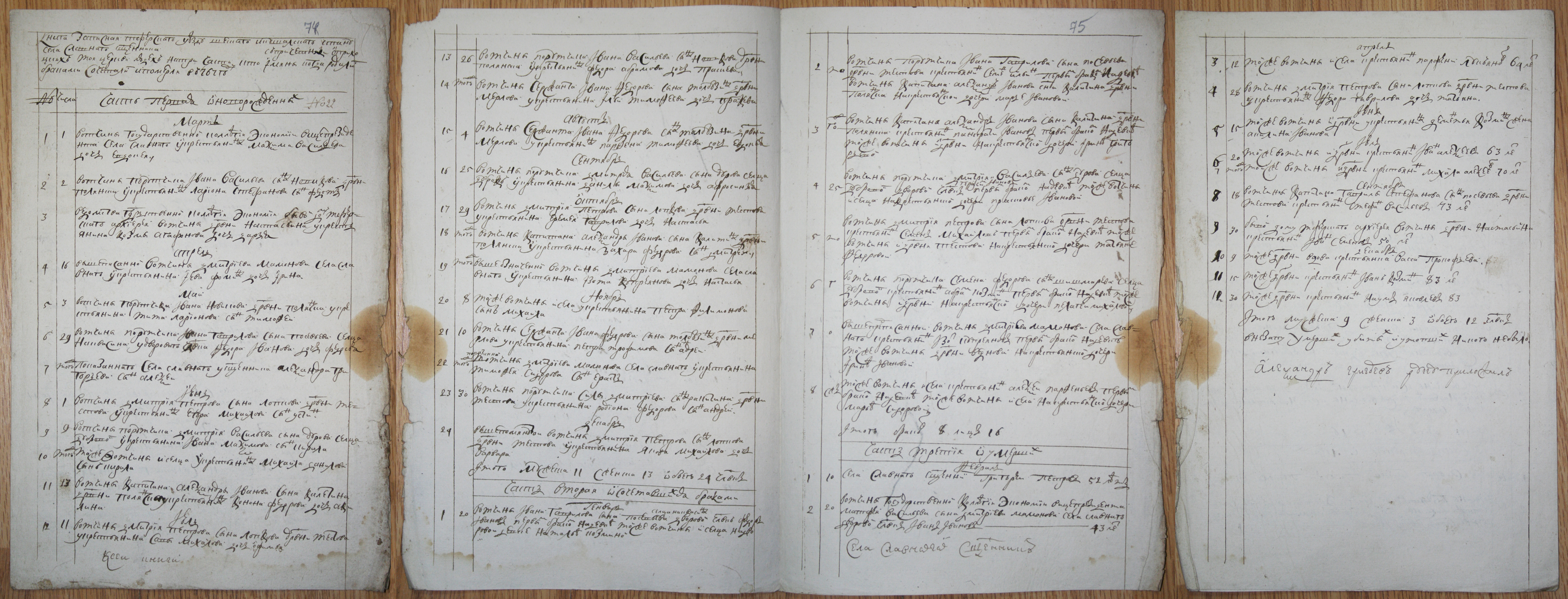 Троечастная метрическая книга села Славного Шеского и Кушальского стана Тверского уезда Тверской провинции Новгородской губернии 1767 года, содержащая текст с палеографическими особенностями.